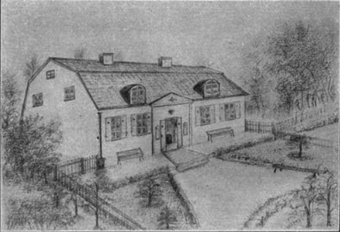 Loviseberg, Strindbergs barndomshem 1857-1860 och 1869-1871, tecknat av brodern Axel Strindberg